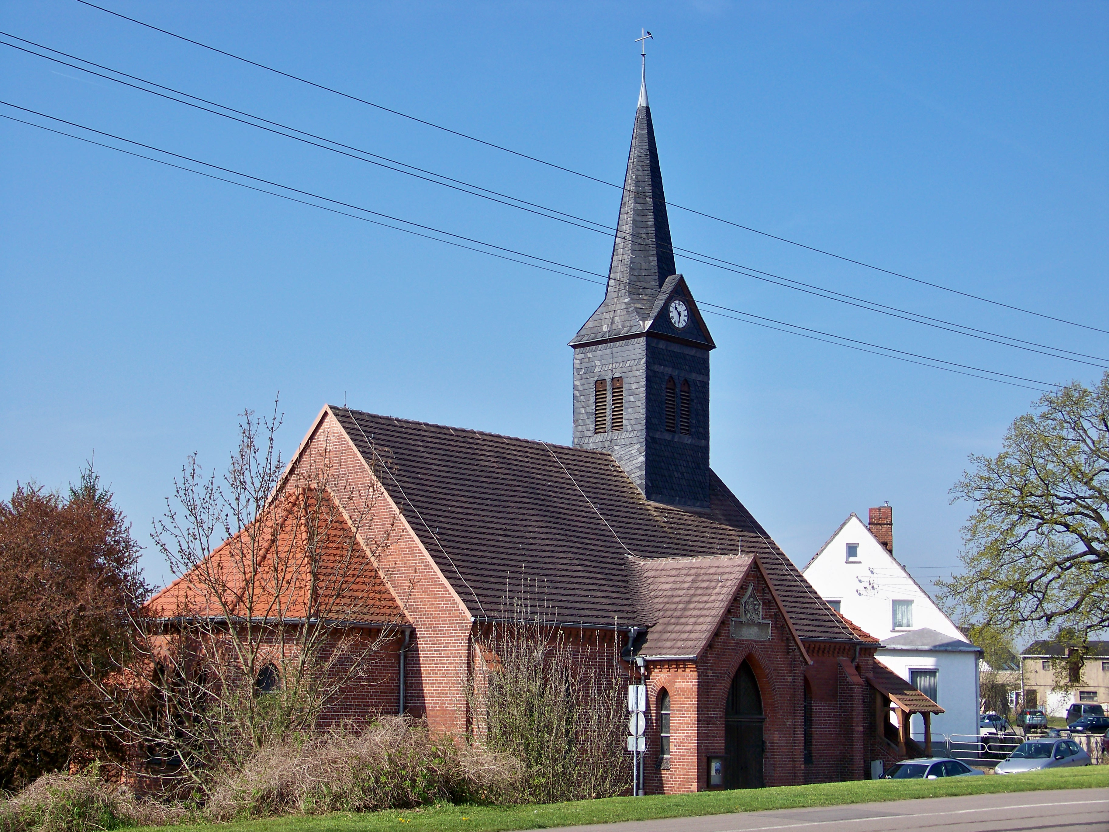 Kreuzkirche in Modelwitz (genauer: Papitz, Schkeuditz)